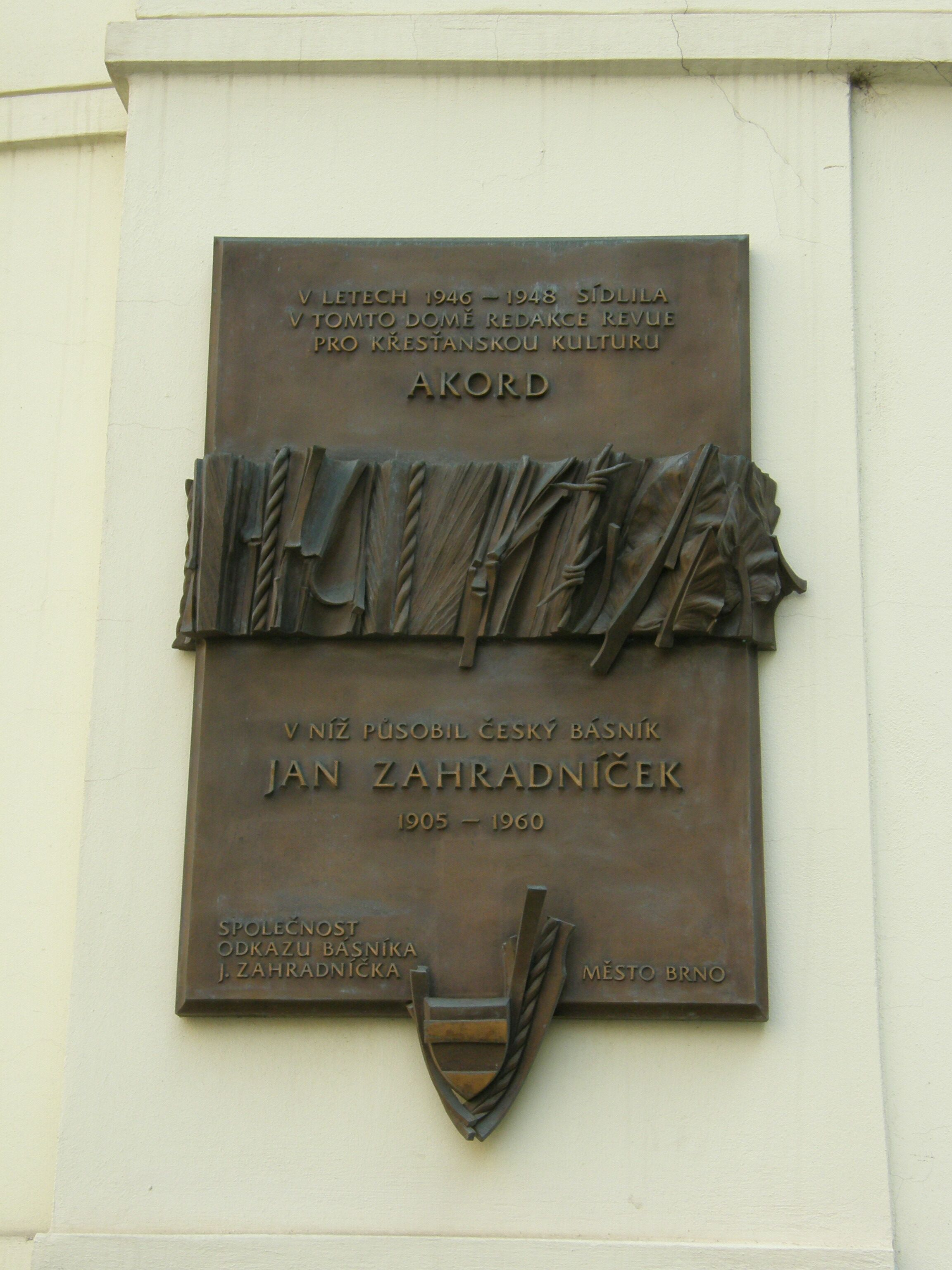 Pametni deska na zdejsi pusobeni J. Zahradnicka (Silingrovo namesti v Brne)